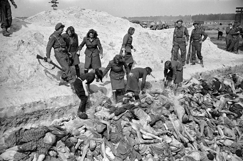 Bergen-Belsen concentration camp